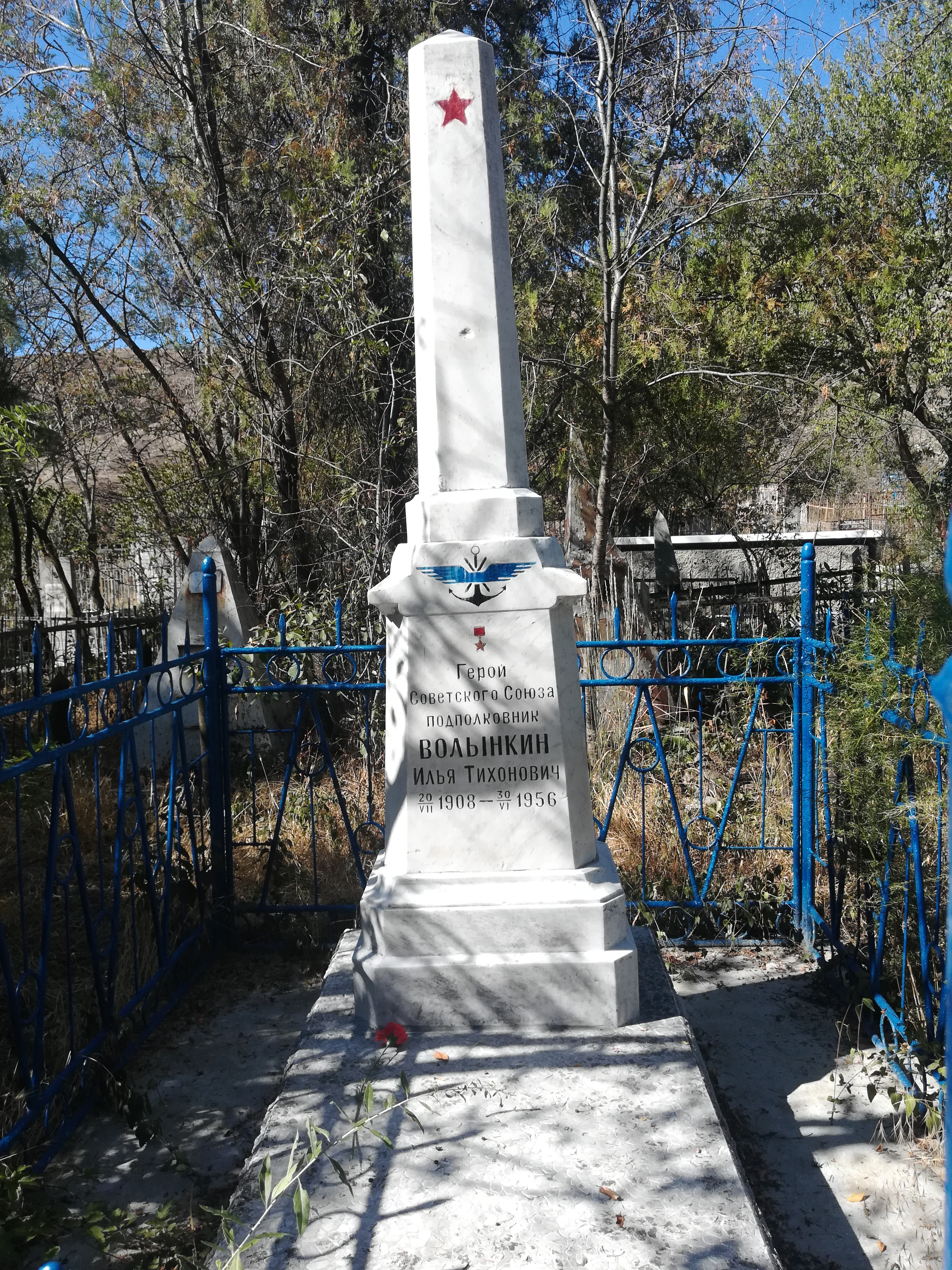 Старое кладбище Феодосии